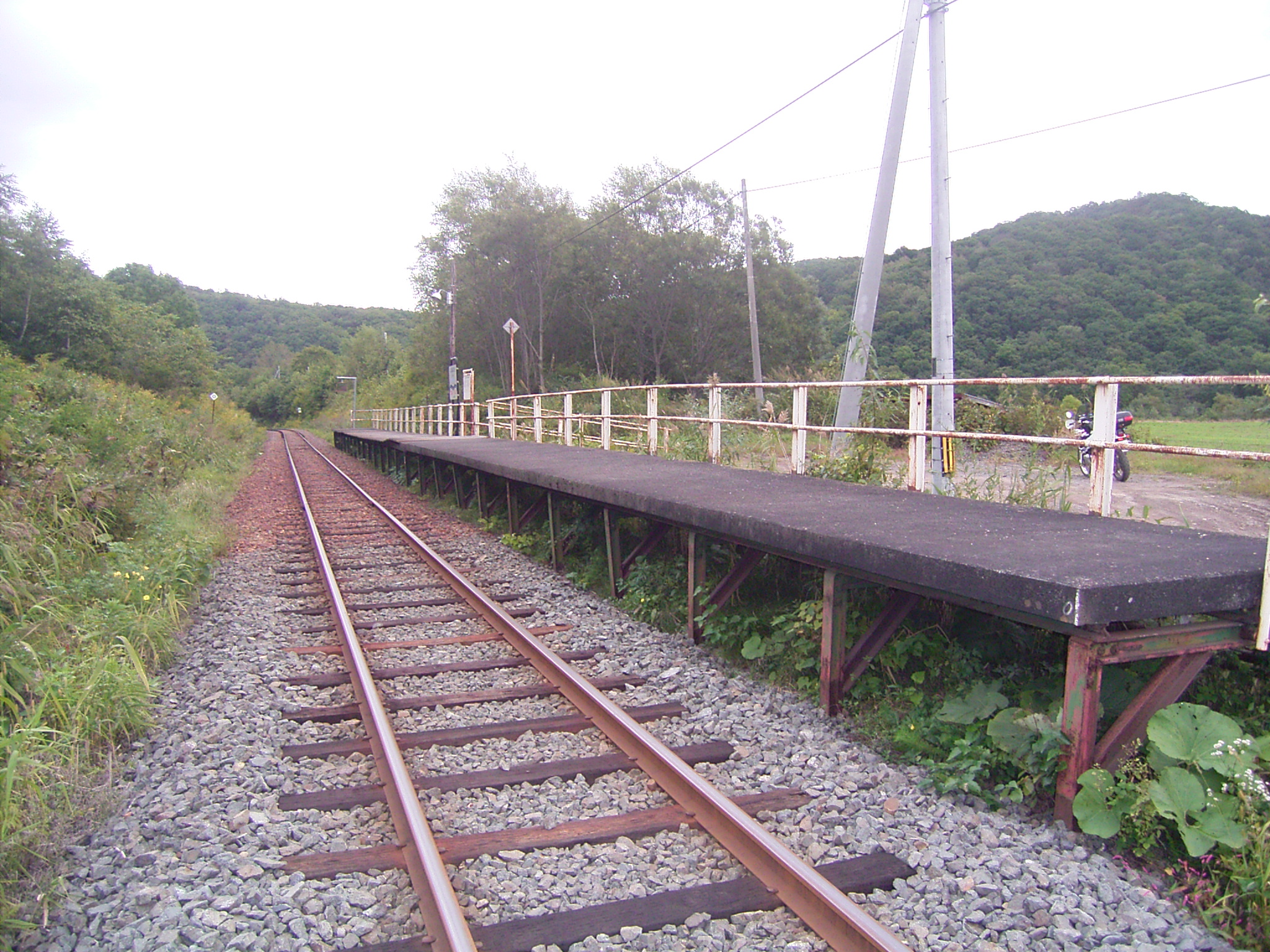 ホーム ２００５年９月２２日撮影